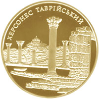 Монета присвячена визначній античній пам’ятці – Херсонесу Таврійському (з грецької – півострів таврів), місту-державі на південно-західному узбережжі Криму, заснованому в 422 – 421 роках до н. е., яке карбувало власну монету.